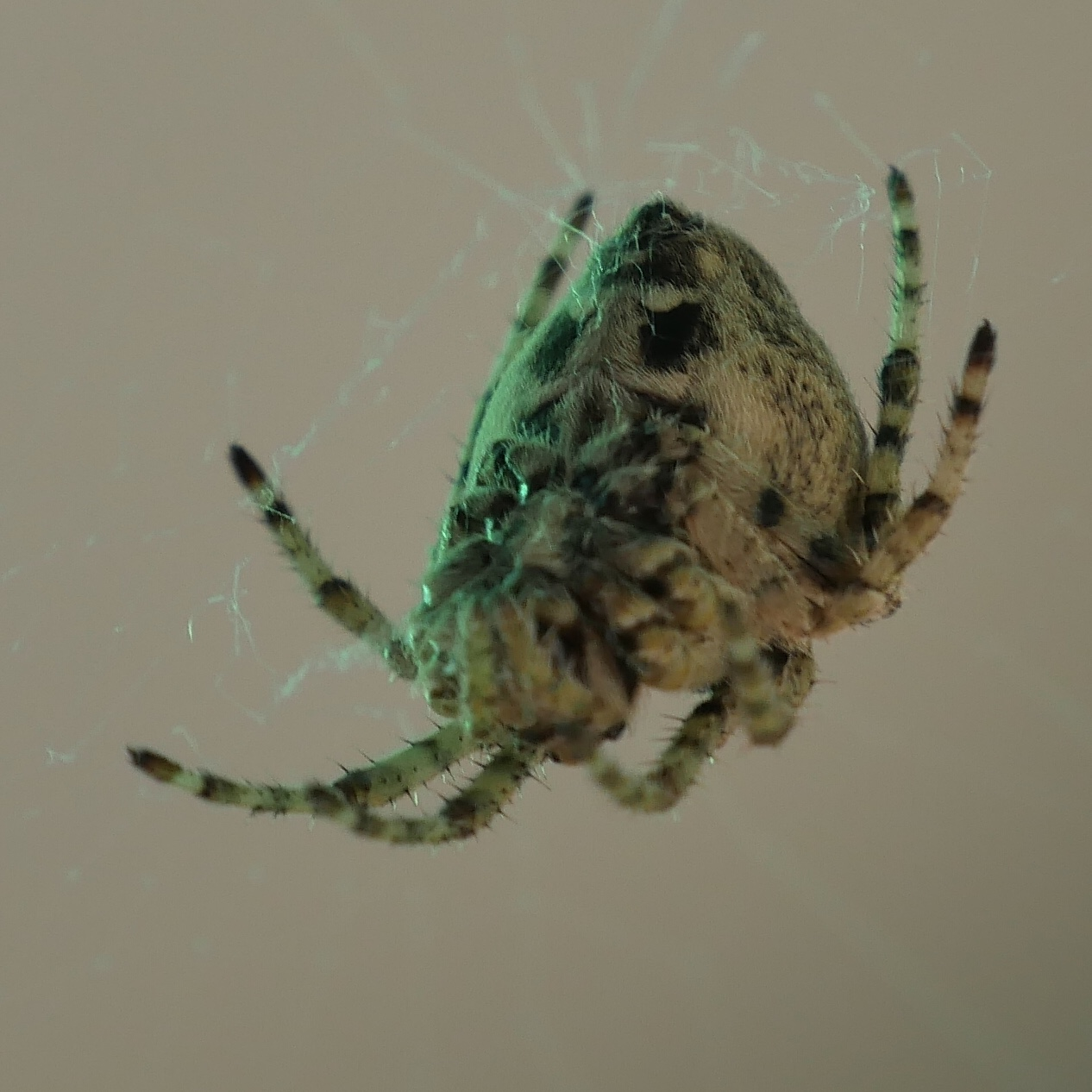 Gibbaranea gibbosa Hungary